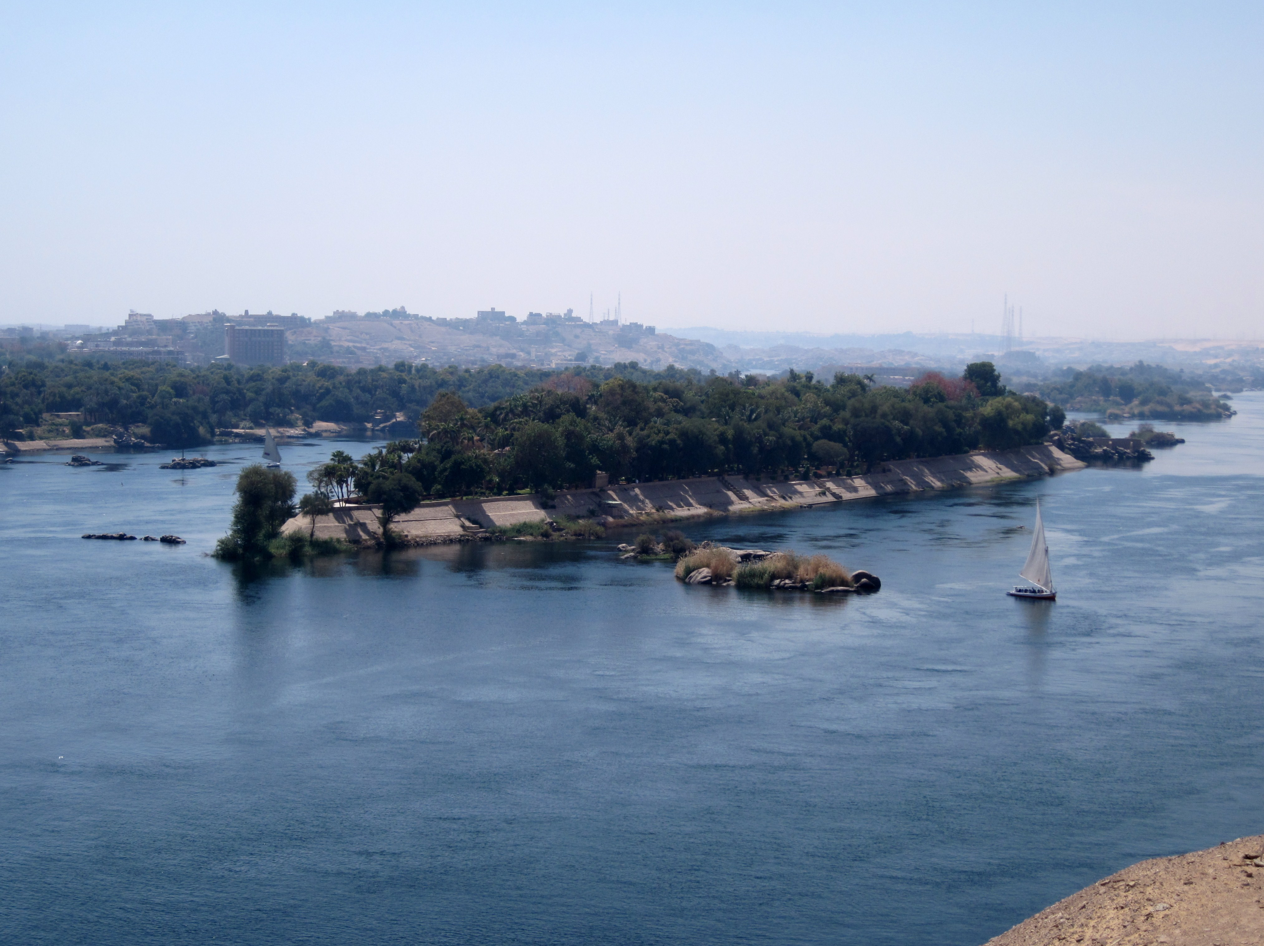 Kitchener-Insel in Assuan, Ägypten